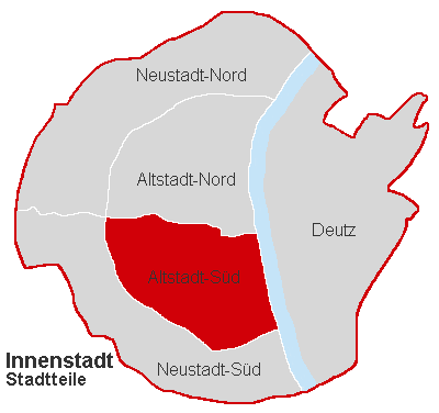 Lagekarte Altstadt-Süd im Stadtbezirk Köln-Innenstadt